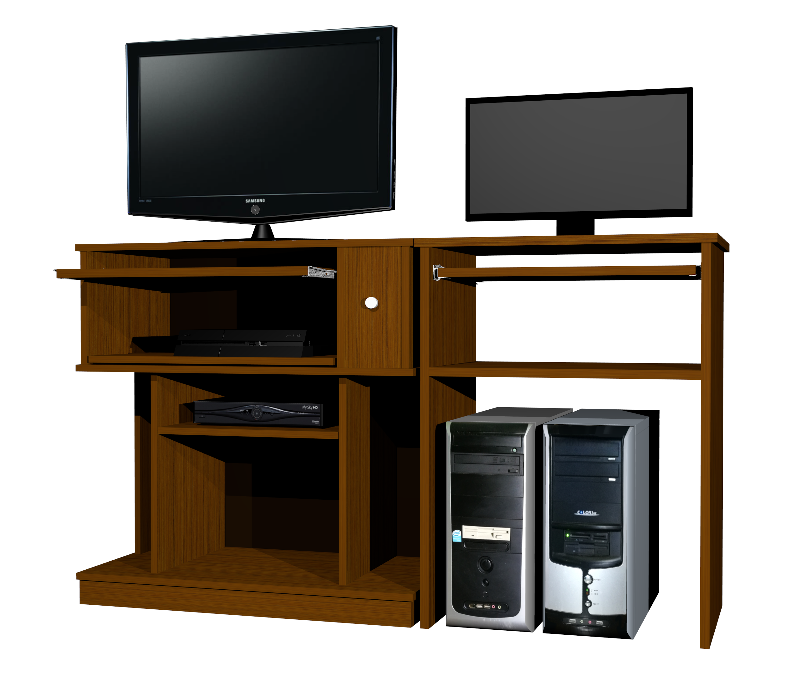 Modello 3D di un set di mobili per la TV e postazione per PC. Realizzato da davi.trip